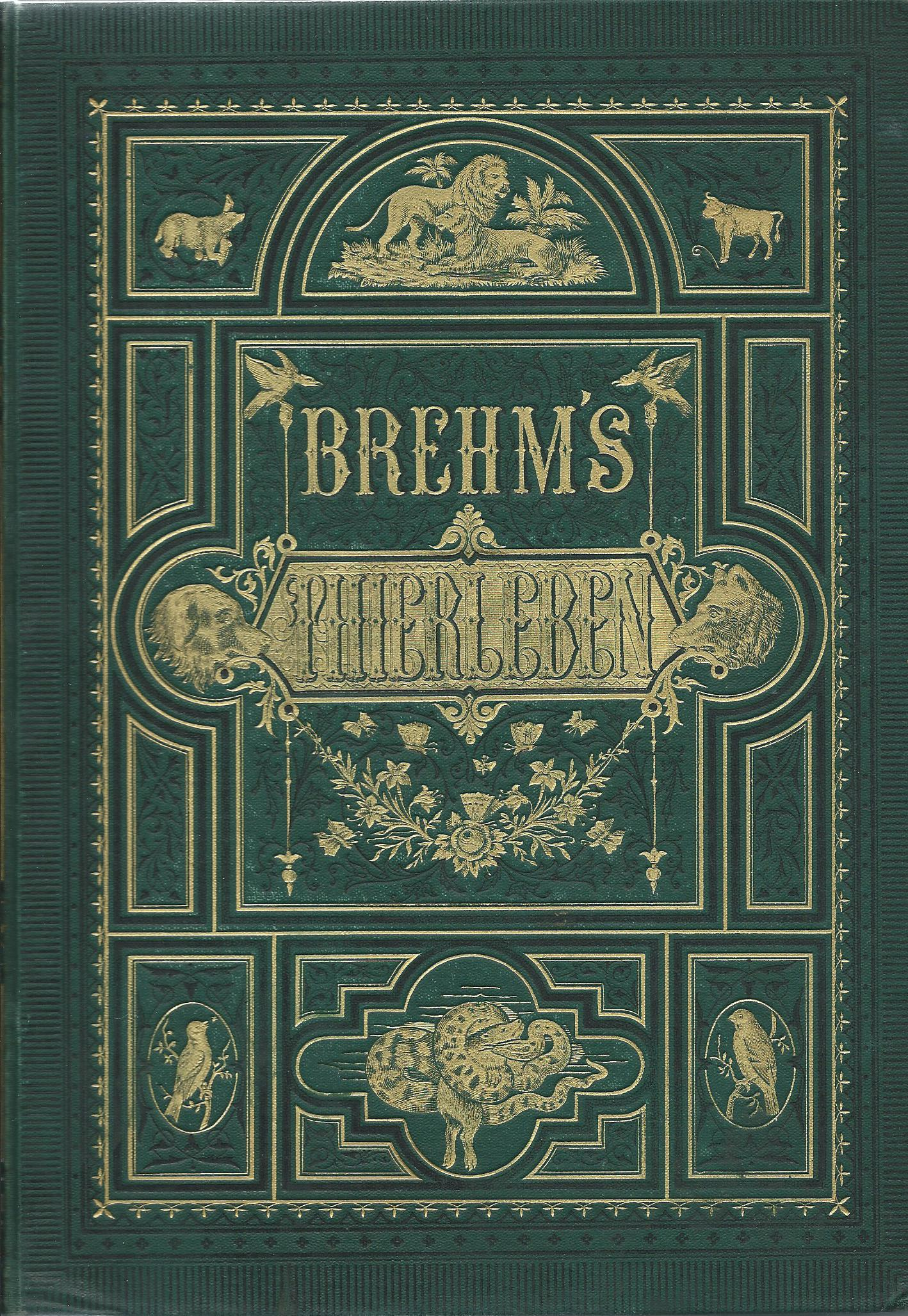 Alfred Brehm Theirleben (Az állatok világa) c. tízkötetes művének borítója